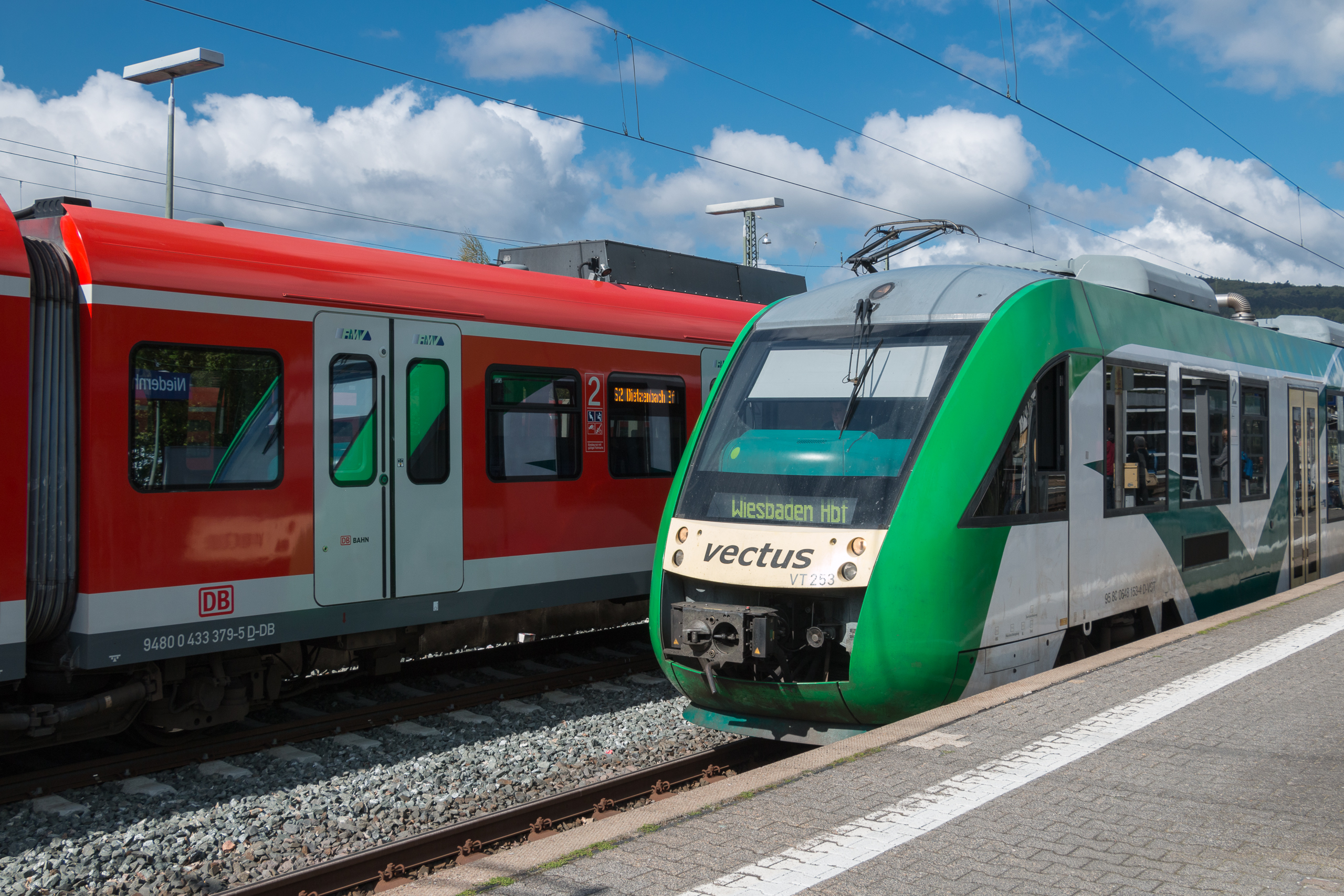 Ein Zug der Firma Vectus und eine S-Bahn der Deutschen Bahn auf dem Bahnhof von Niedernhausen